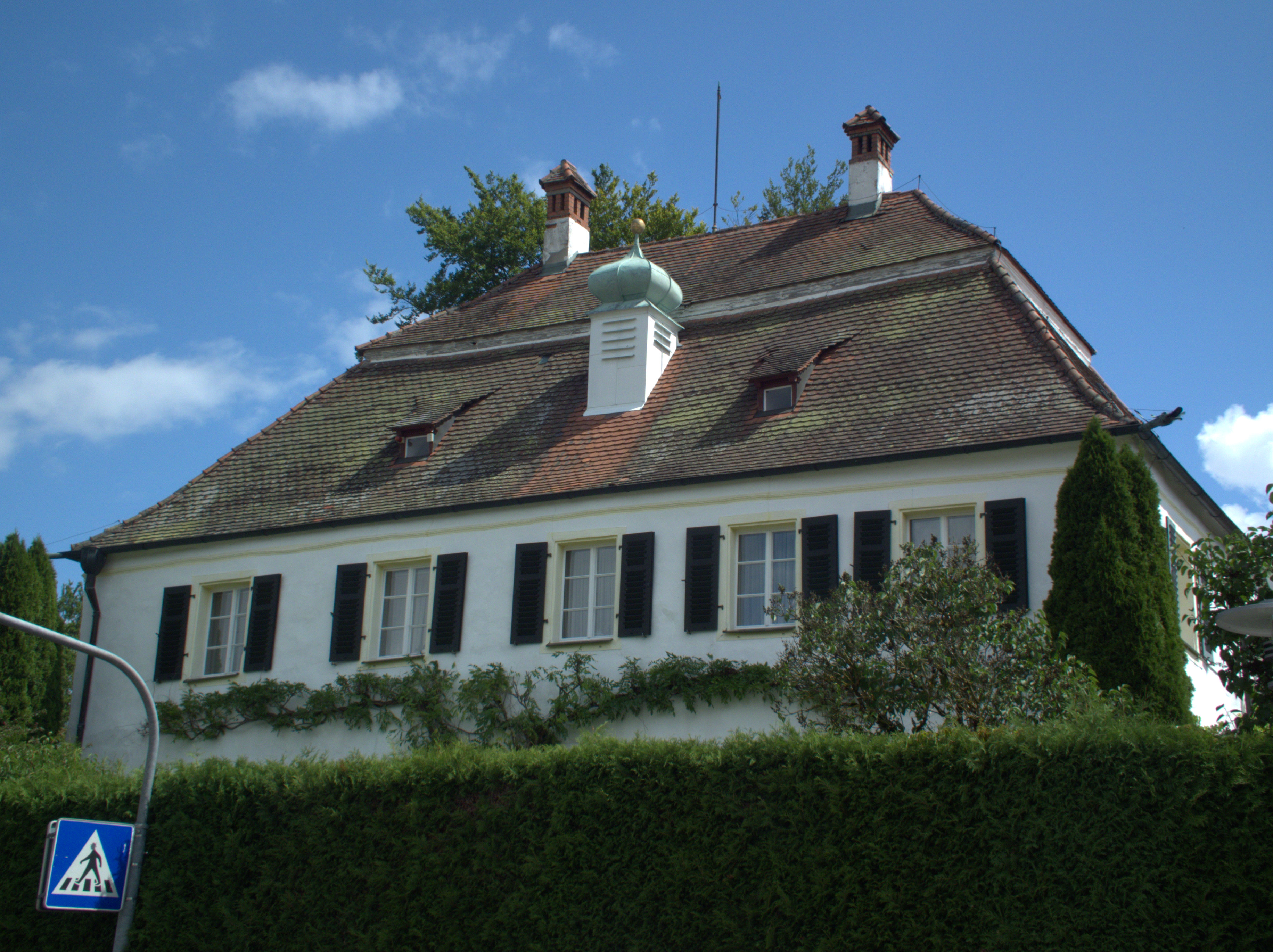 Schloss Deining in der Oberpfalz: Schlossgebäude von Westen